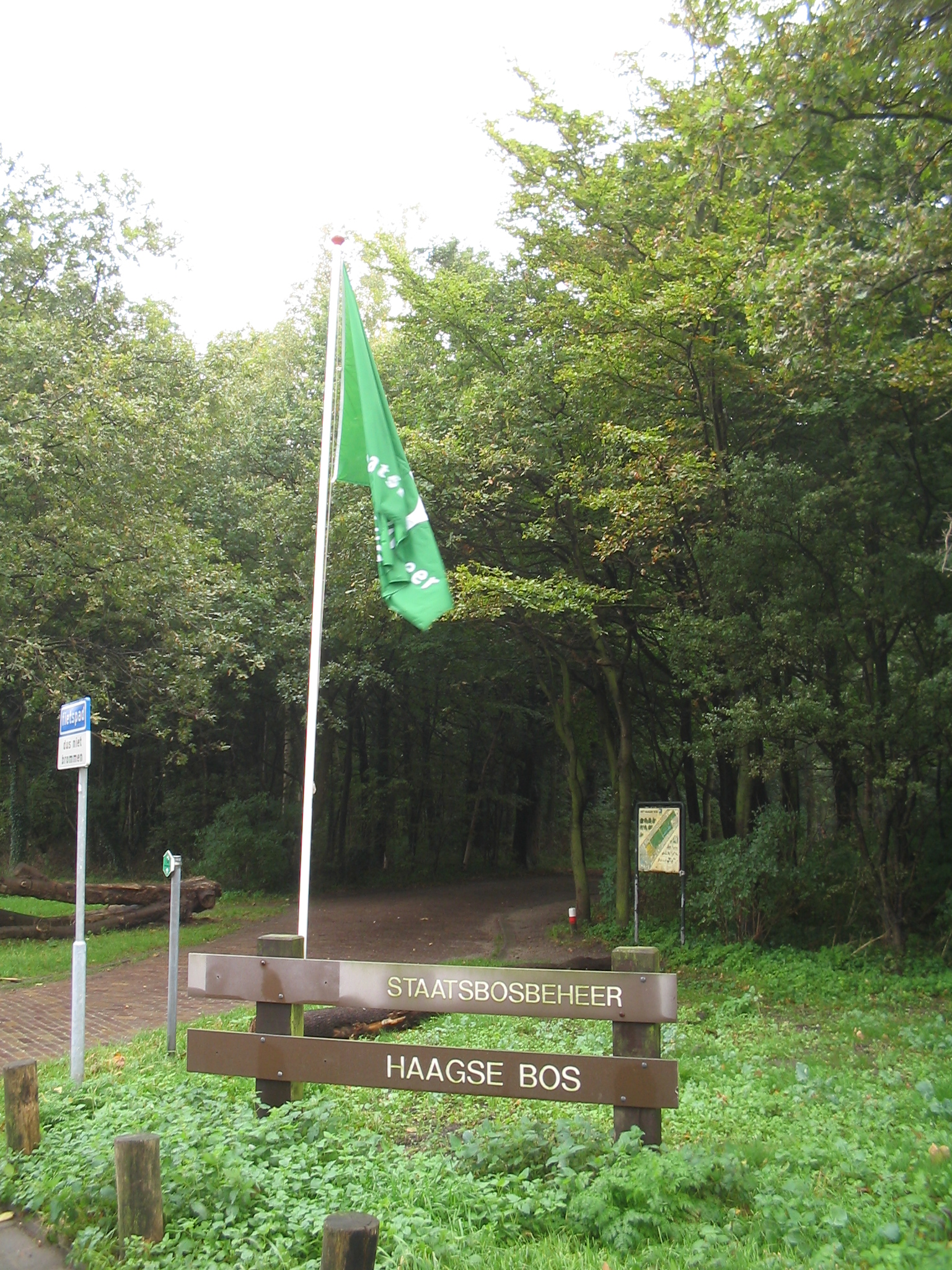 Haagse Bos, Den Haag, Netherlands, 21 oktober 2005